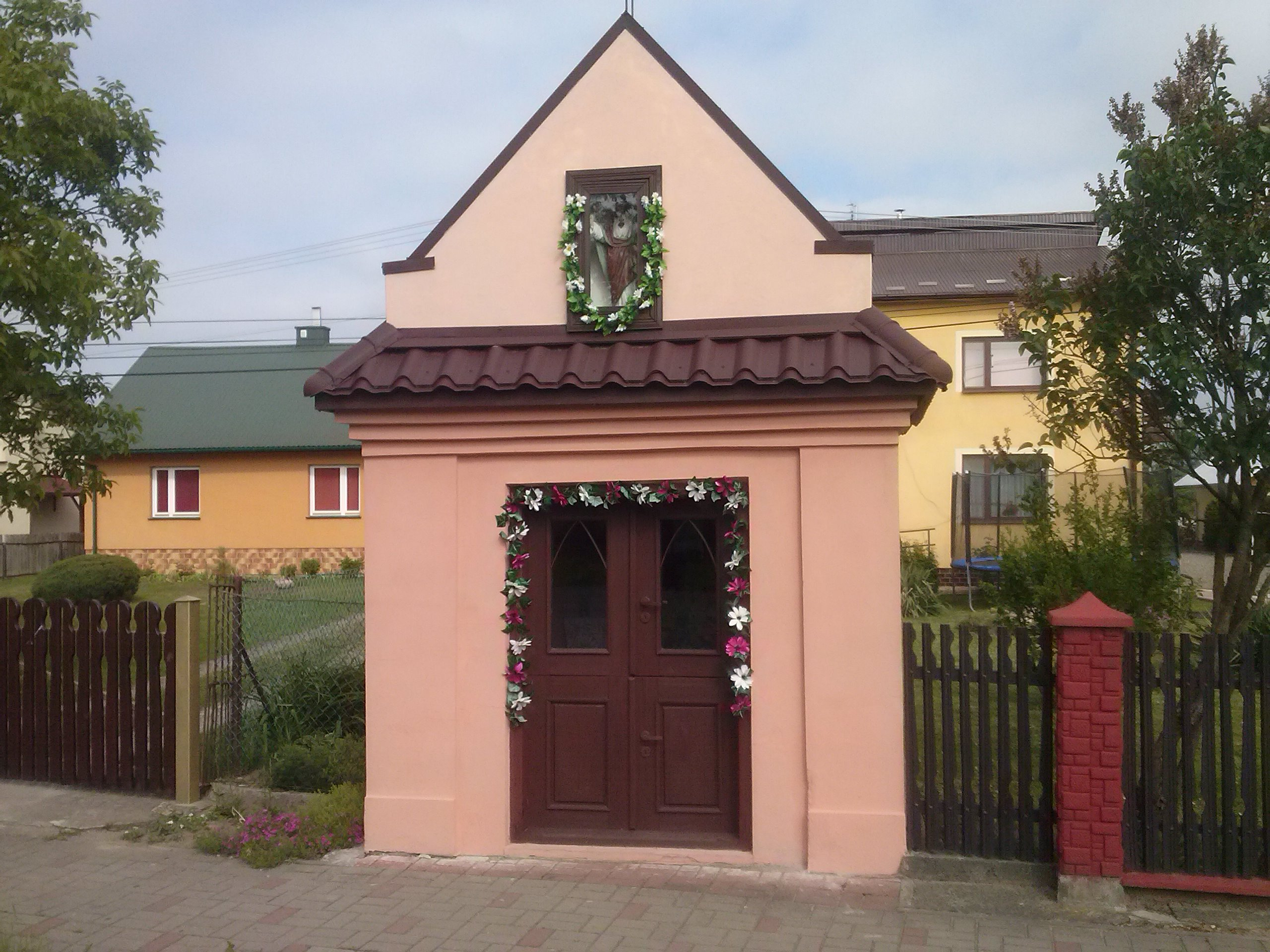 Kapliczka z XIX wieku